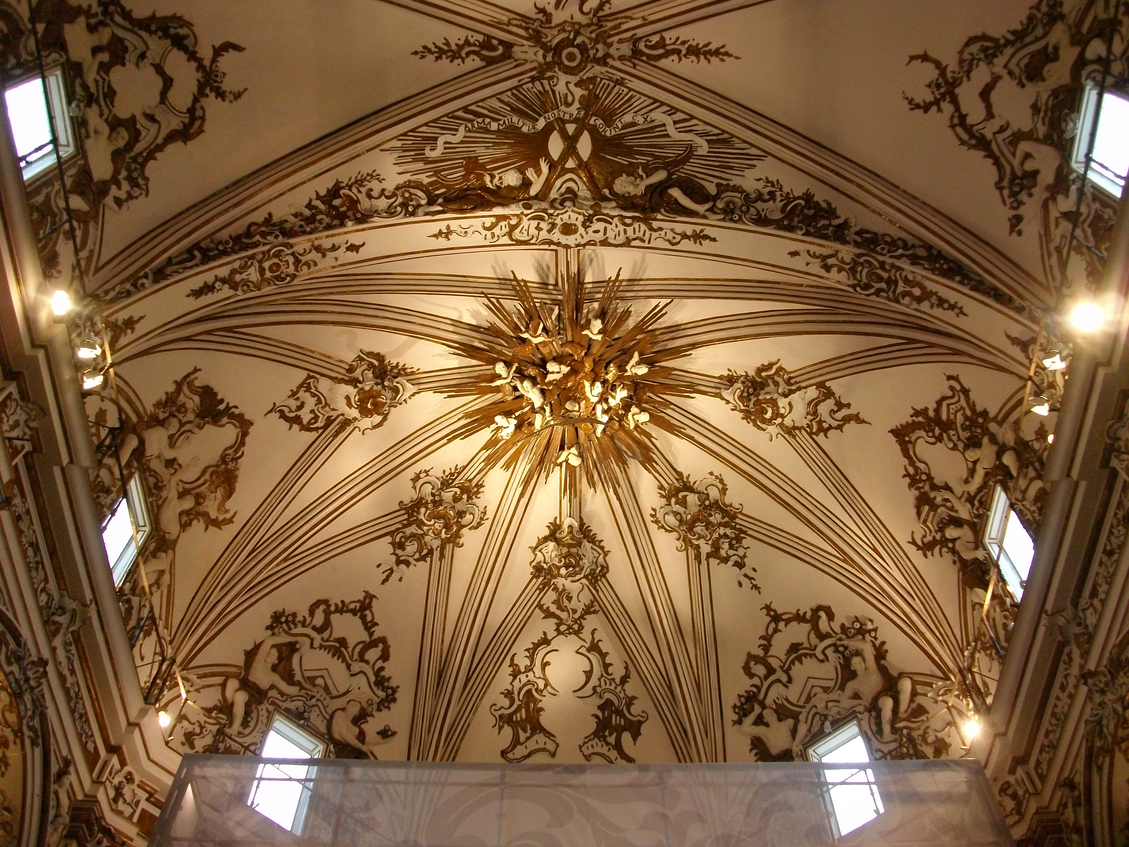 Església de Sant Joan de la Creu, abans de Sant Andreu, capçalera. València, l'Horta, País Valencià.